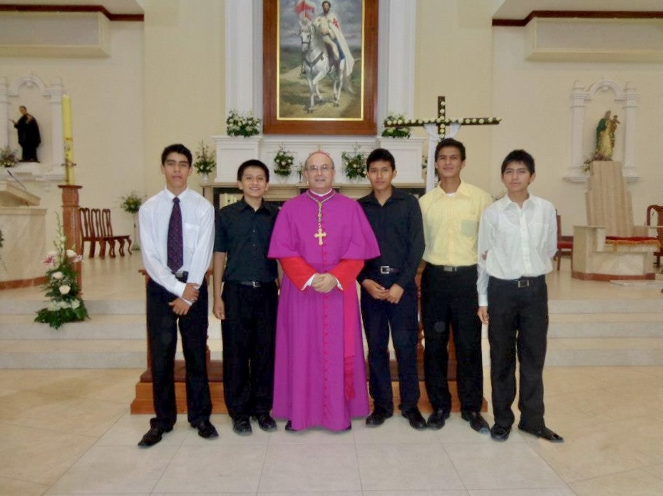 Un grupo de monaguillos sin el ornamento, junto con el Obispo Prelado en la Catedral de la ciudad de Moyobamba.